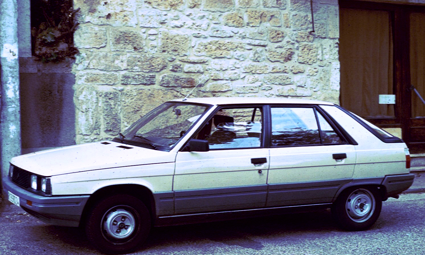 Renault 11 5 door in Spain